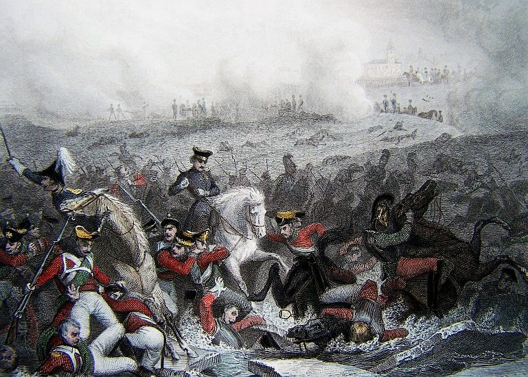 Trận Austerlitz còn được gọi là Trận Ba Hoàng đế hay Trận Tam Hoàng là một trận đánh nổi tiếng trong cuộc Chiến tranh với Liên minh thứ ba.